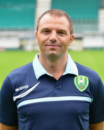 Maurice Steijn